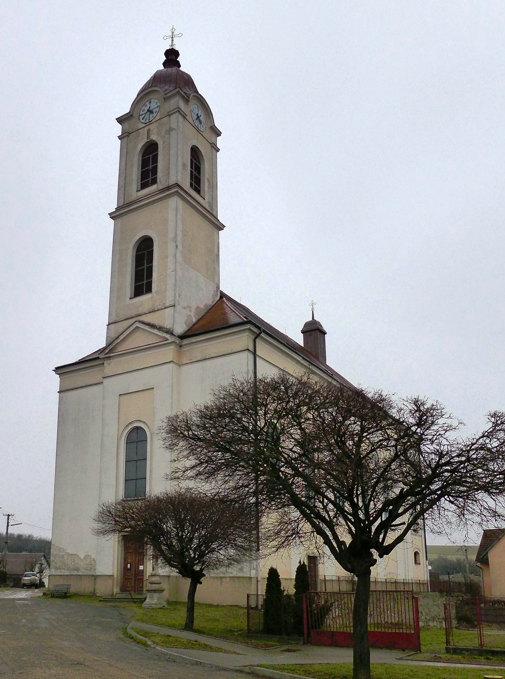 Kostel svatého Bartoloměje (Opatov), Opatov